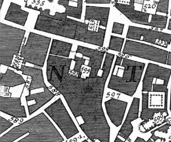 Pianta di Nolli